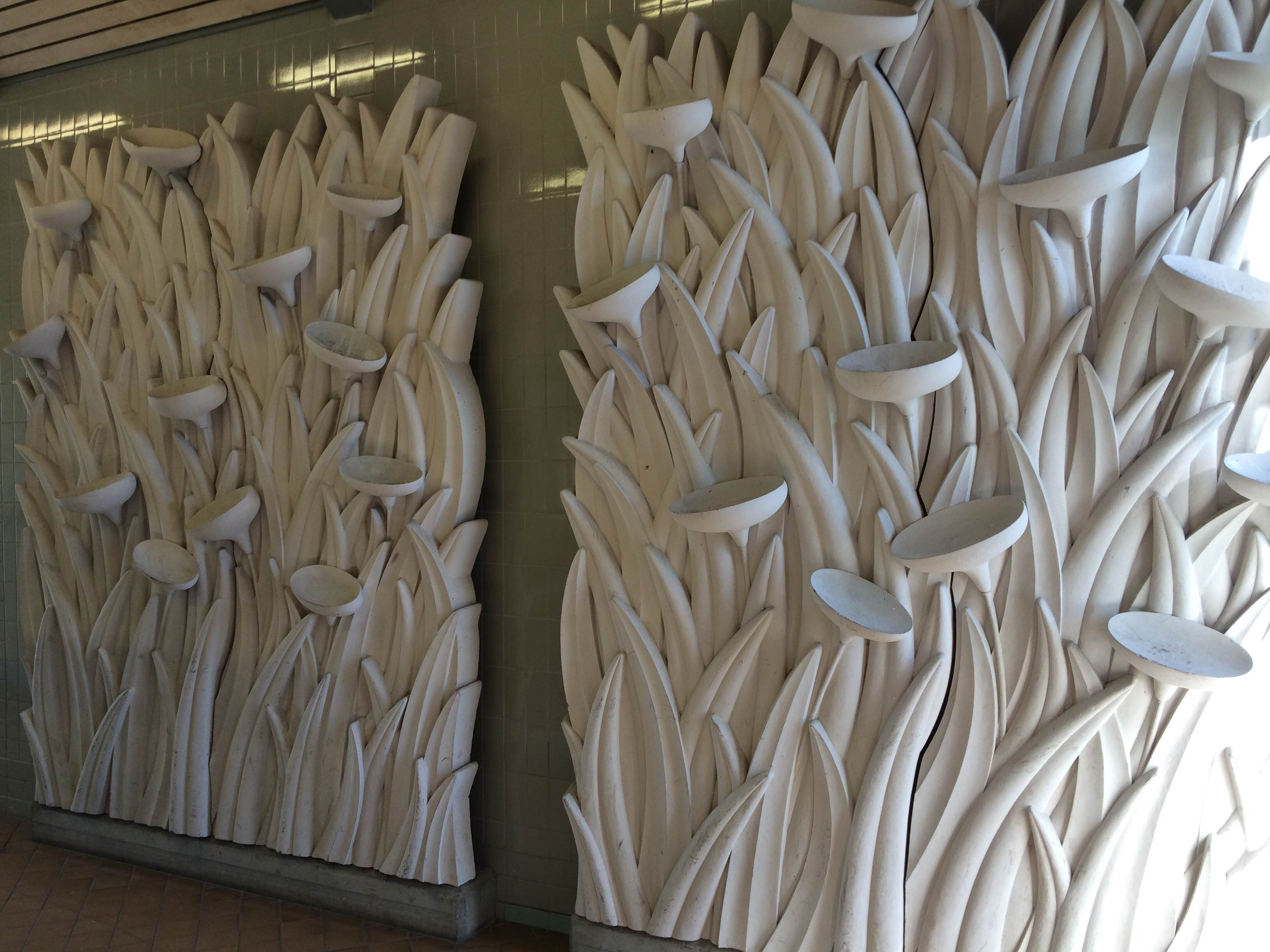 Från tvåflodslandet (2005) - Kennet Williamsson It is not clear whether freedom of panorama applies to this image. This is a depiction of a building or work of art in Sweden. The depicted work is believed to be protected by copyright. According to Article 24 of the Swedish copyright act, "Works of art may be depicted if they are permanently placed on or at a public place outdoors. Buildings may be freely depicted." It has been widely accepted that this provision made distribution of depictions such as this one legal. On 4 April 2016, however, the Supreme Court of Sweden issued a statement that Article 24 does not extend to publication in online repositories, and on 6 July 2017, a lower court ruled that linking to depictions of copyrighted artworks hosted on Commons constitutes copyright infringement. See COM:CRT/Sweden#Freedom of panorama for more information. The implications of these decisions on Commons' ability to continue to distribute this and other depictions like it are currently under analysis. Reusing or linking to this file may have legal consequences. You are solely responsible for ensuring that you do not infringe the copyright belonging to someone else. See our general disclaimer for more information.